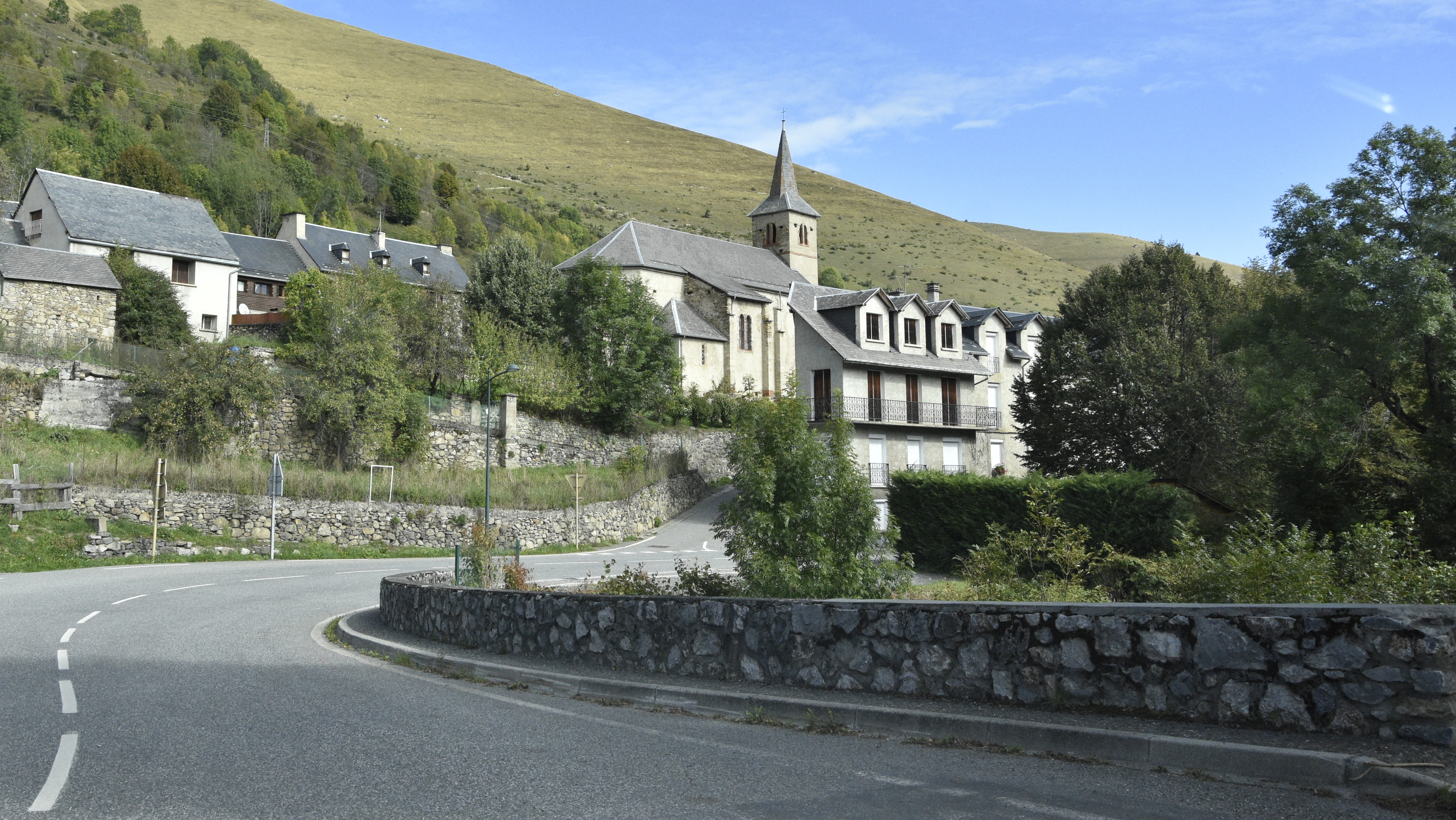 Église Saint-Jean-Baptiste - Garin 7-10-2019 12-26-03